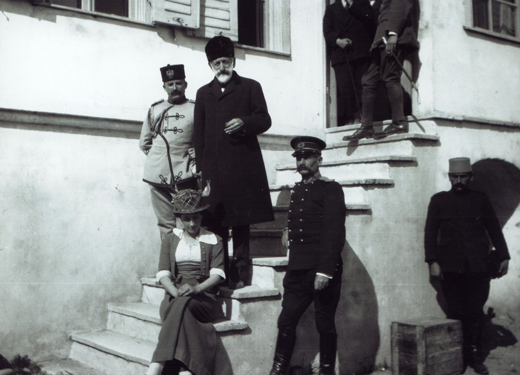 DMM E03 Essad Pasha Toptani, Turhan Pasha Përmeti, Countess Villebrosa (or Princess Sophie?) and General De Veer emerging from Toptani's house. April 1914 (Photo: De Iongh). / Esad pashë Toptani, Turhan pashë Përmeti, Kontesa Villebrosa (ose Princesha Sofi?) dhe Gjenerali De Veer duke dalë nga shtëpia e Esat Toptanit në Durrës. 1914 (Foto: De Iongh).